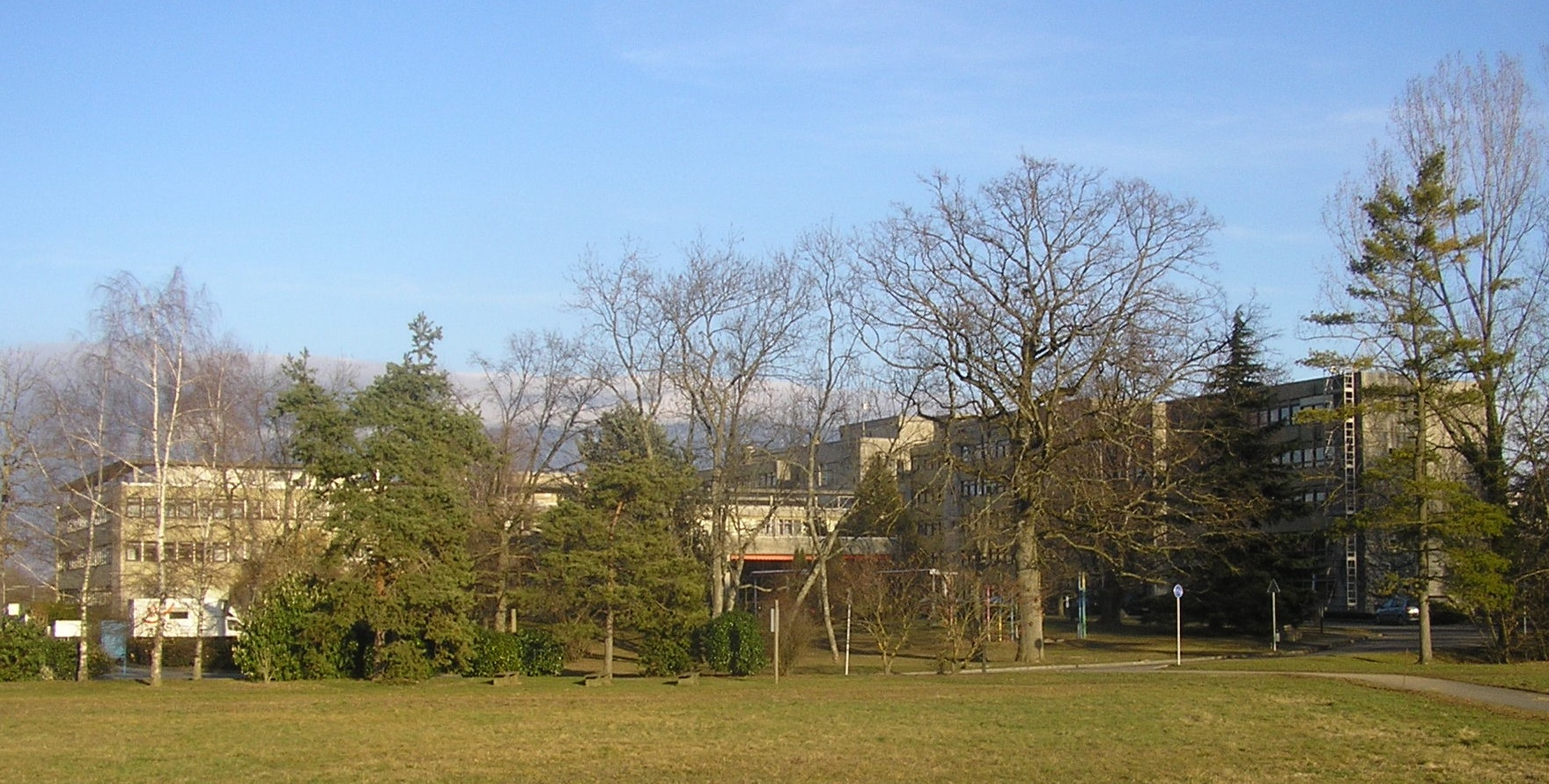 Vue générale de « l'Hôpital des Trois-Chênes », hôpital de gériatrie sur la commune de Thônex en Suisse.